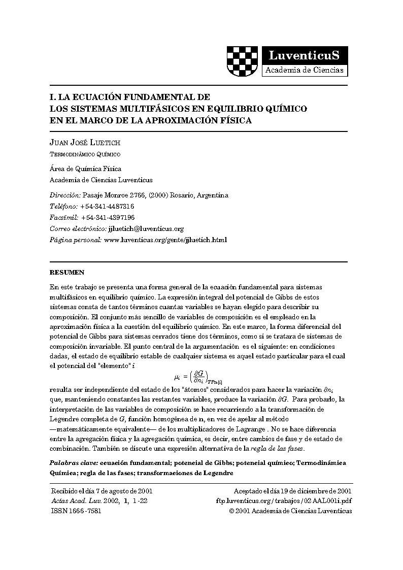 Actas de la Academia Luventicus Vol1 No1 Art1 Pag1